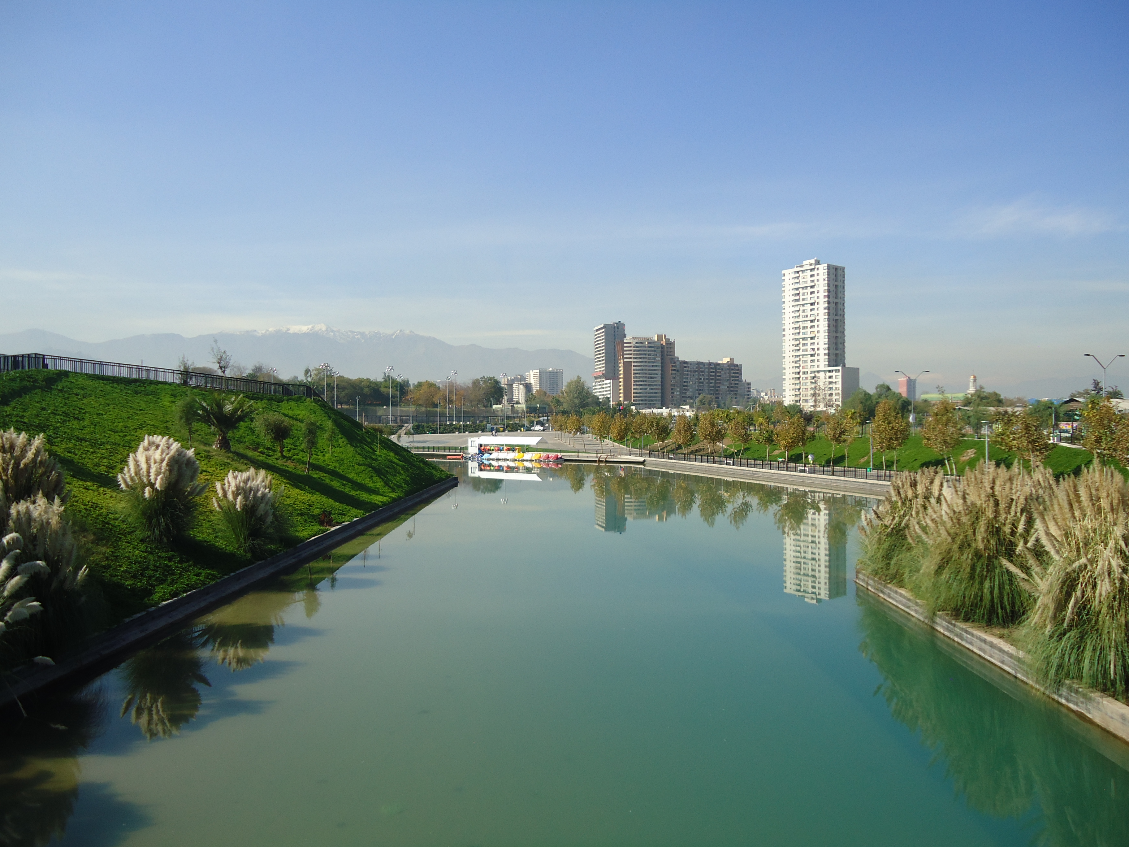 Laguna artifircial con agua del río Mapocho